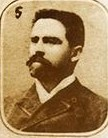 Hijo de José Santiago Gandarillas Guzmán y de Carmen Luco Huici. Hermano de los parlamentarios y ministros José Antonio, Alberto, Francisco y Juan. Estudio en el colegio de los Padres Franceses y en el Instituto Nacional. Ejerció como ministro de Hacienda entre el 5 de septiembre y el 13 de octubre de 1885, y una vez más entre el 21 de enero de 1890 y el 11 de agosto de 1890. Tras la revolución de 1891, por ser ministro y apoyar a José Manuel Balmaceda, fue atacado tanto él como su familia, viendo su nombre y honra mancillados, al no soportar la situación, se suicidó cortándose la arteria carótida con una navaja de afeitar, el 11 de noviembre de 1891.